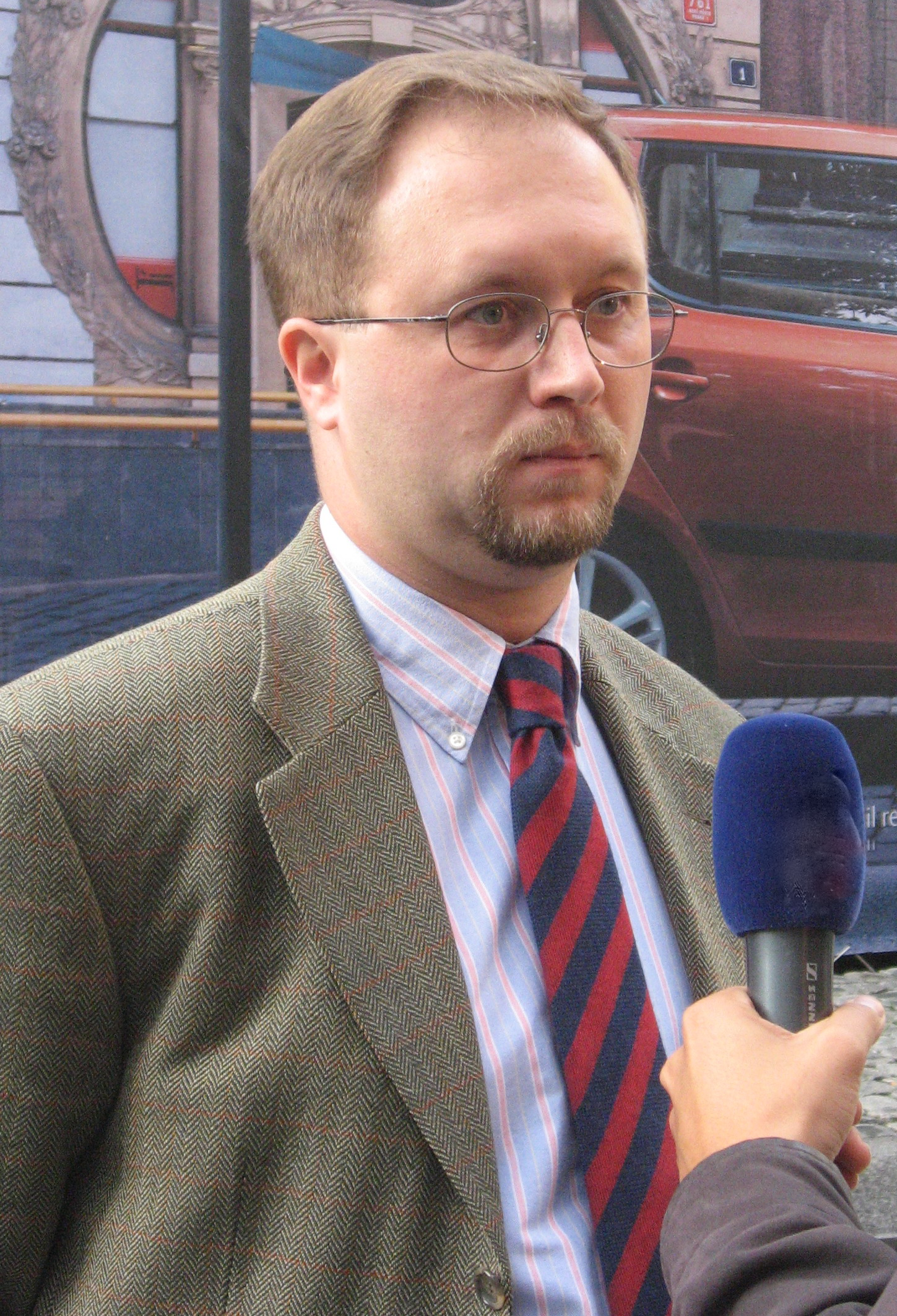 Roman Joch